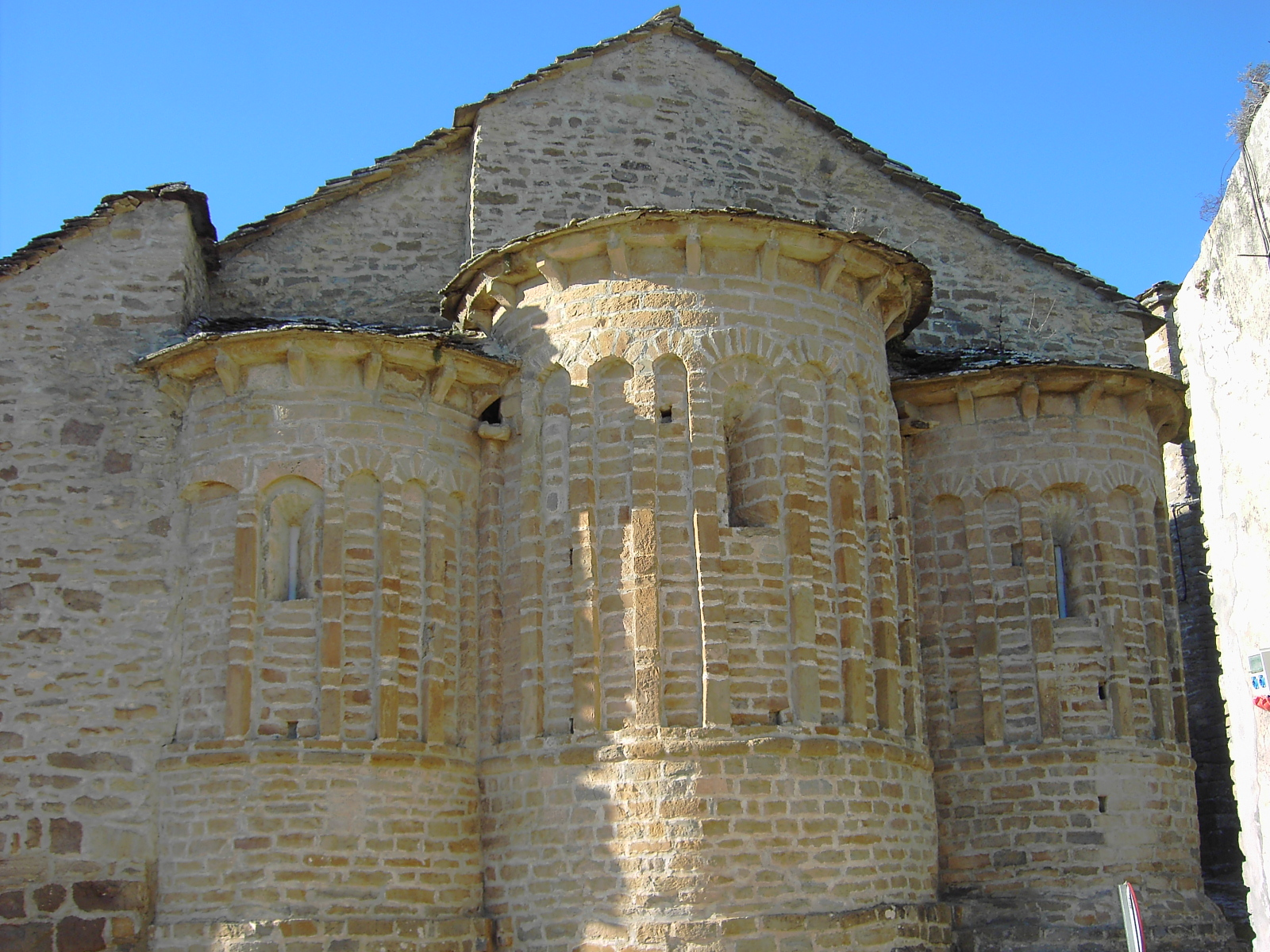 El carácterístico triple ábside de la iglesia románica de San Martín en Buil.